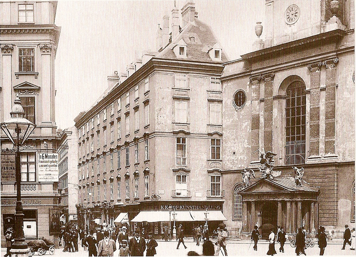 Wiener Kohlmarkt und Michaelerplatz / The Kohlmarkt and the Michaelerplatz in Vienna